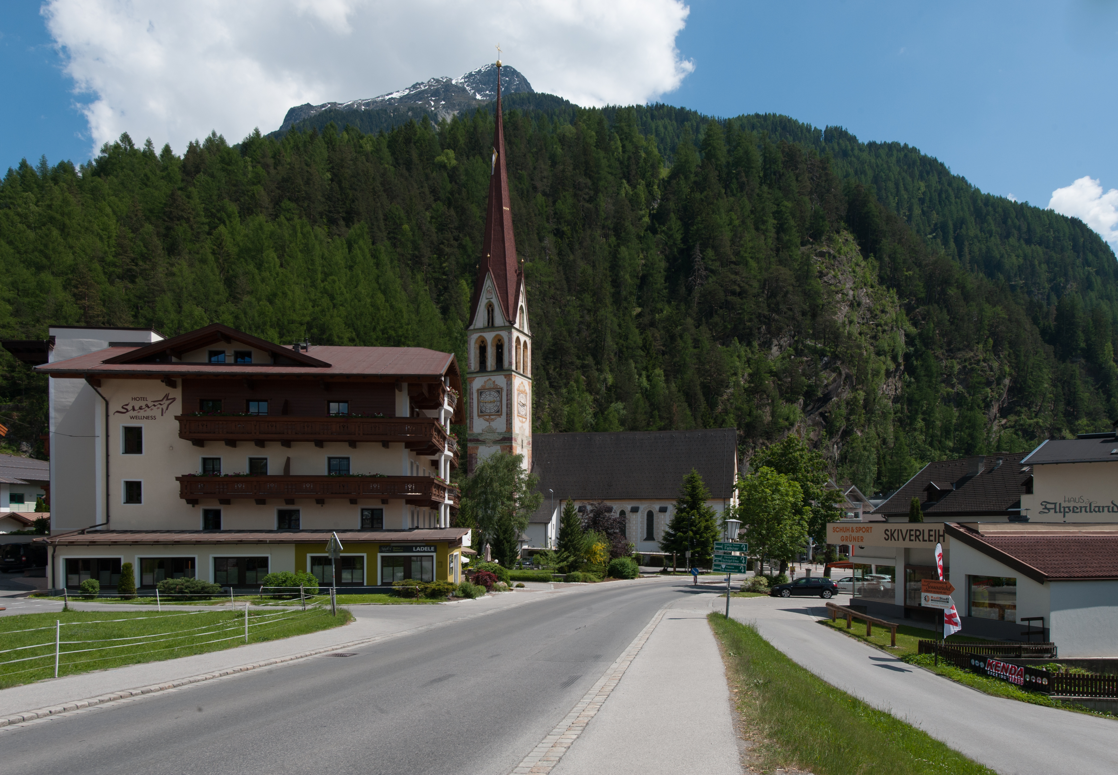 Wiki takes Nordtiroler Oberland: Längenfeld